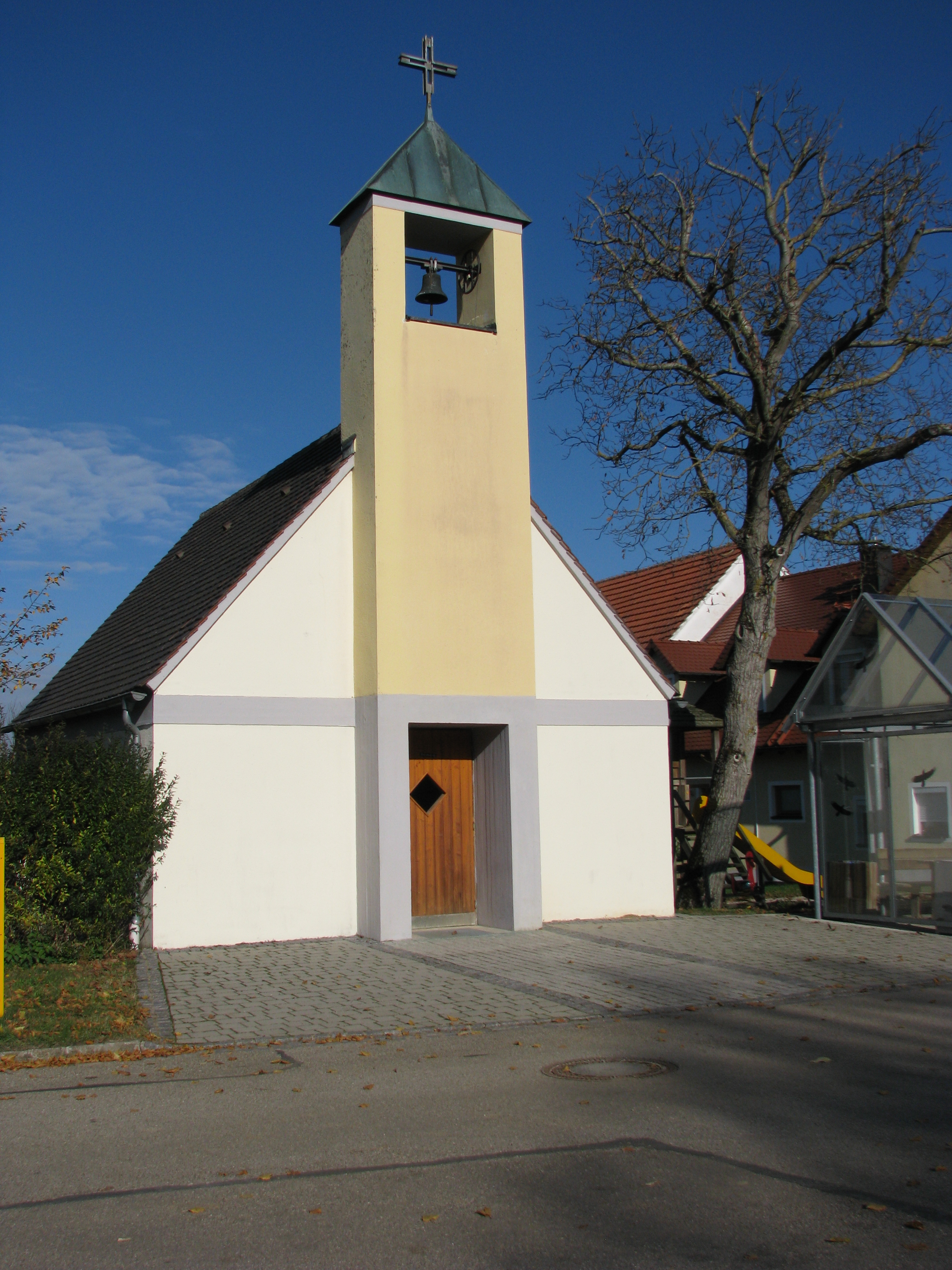 Tandl, Ortsteil von Hilpoltstein Im mittelfränkischen Landkreis Roth